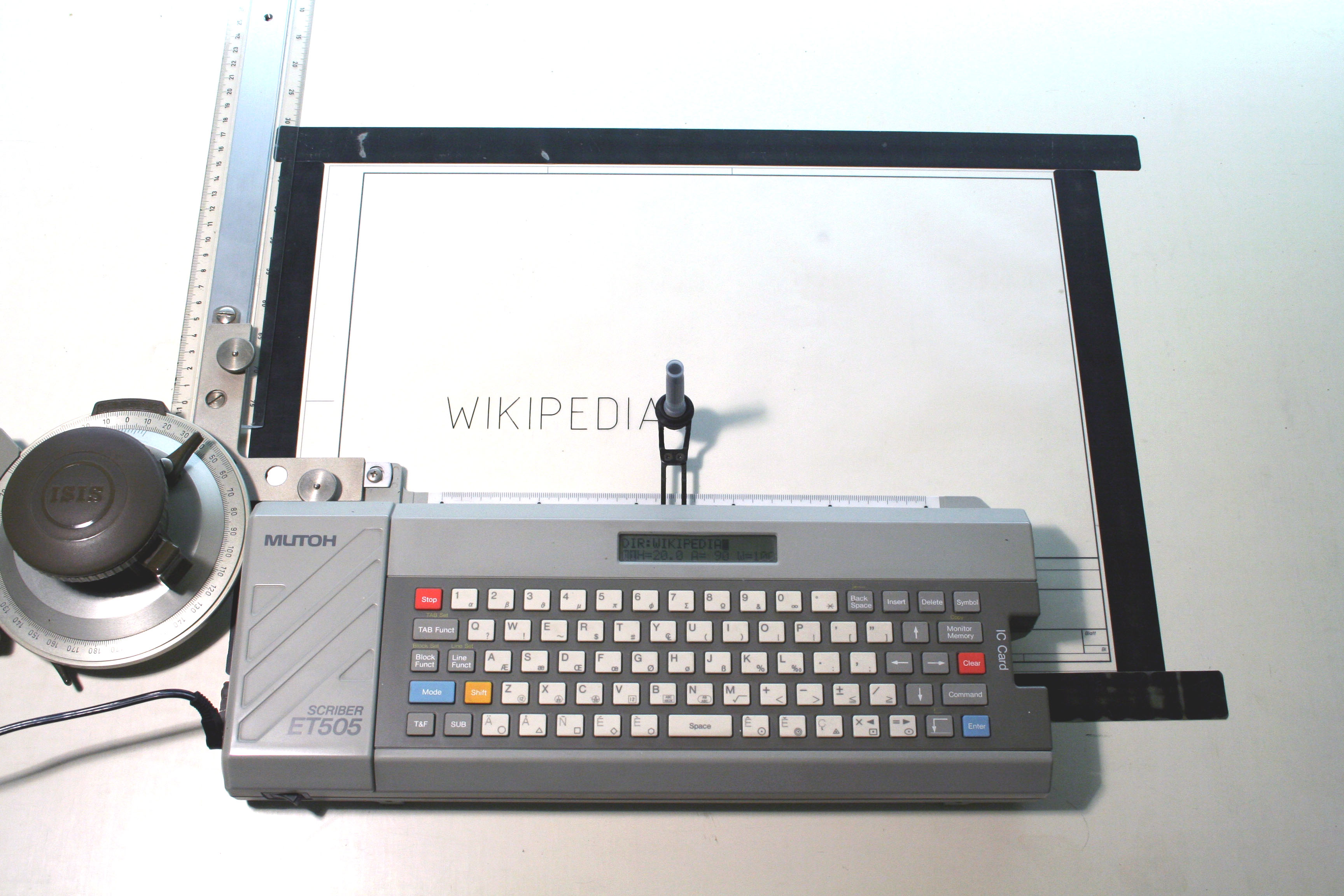 Bild eines Scribers